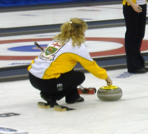 Jennifer Jones